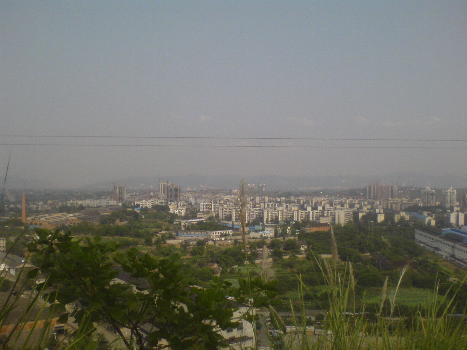 西彭